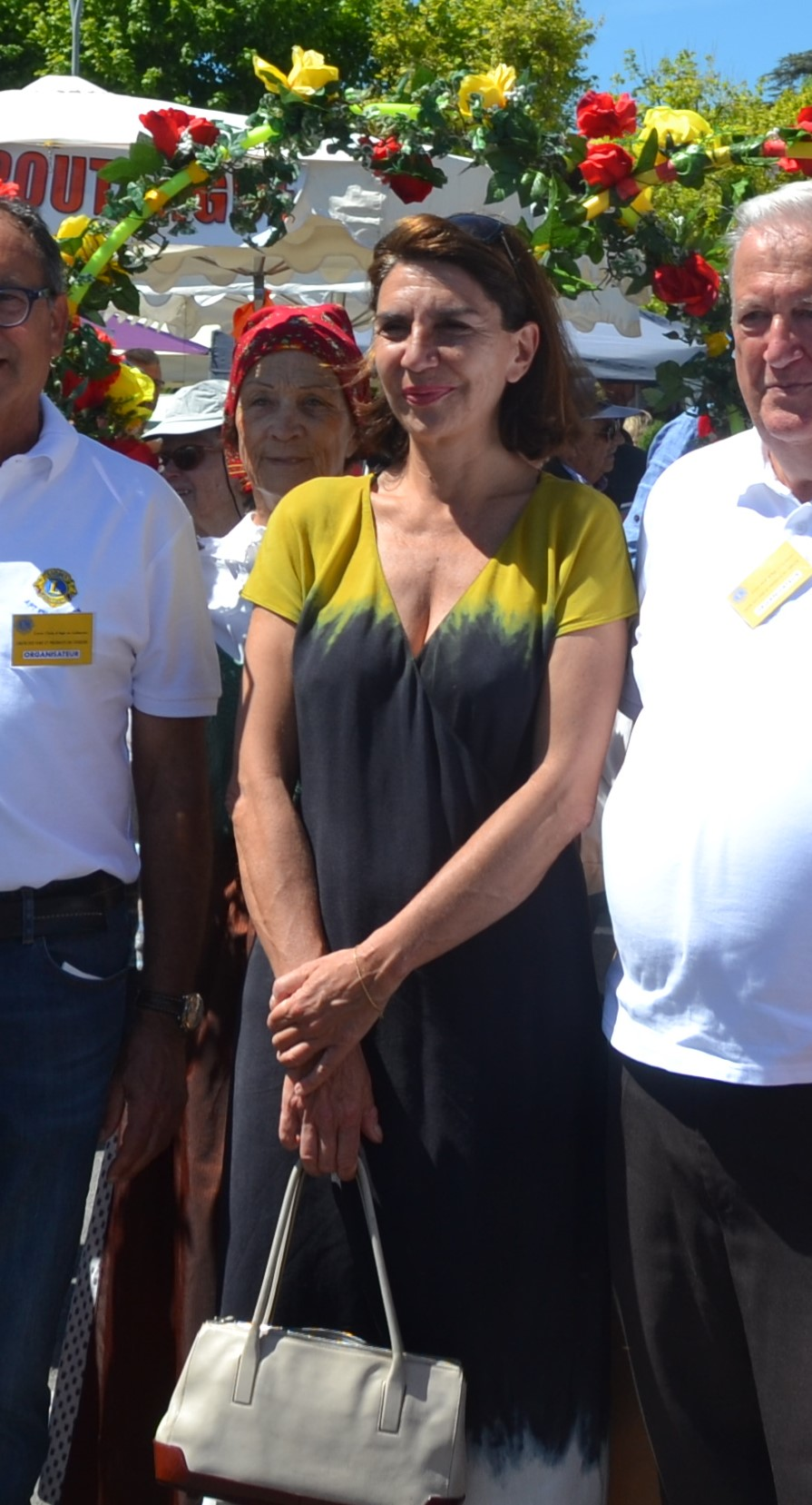 au salon des vins et produits du terroirs 2019